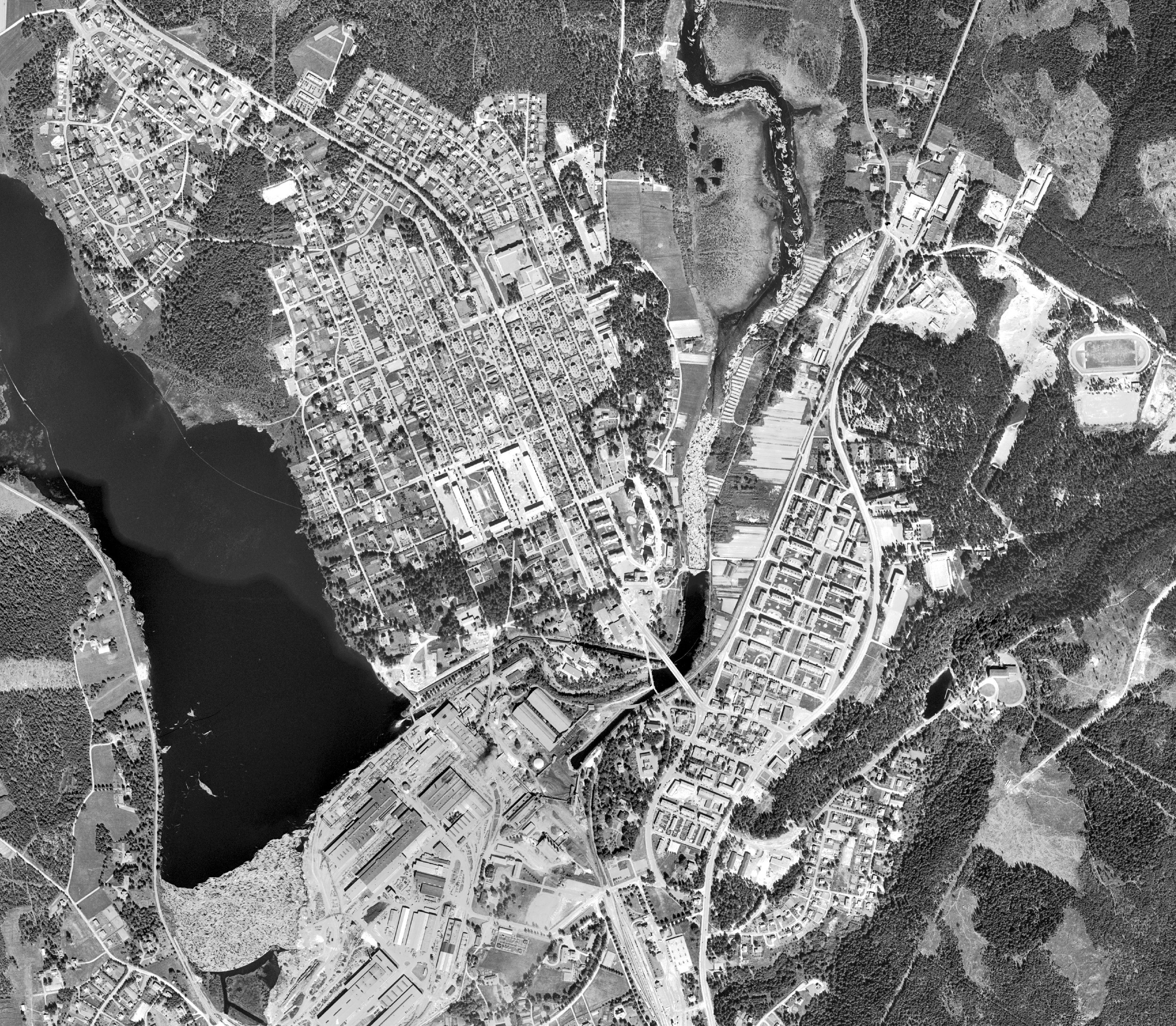 Flygfoto över Hagfors, bilden är tagen någon gång mellan 1955-1965.